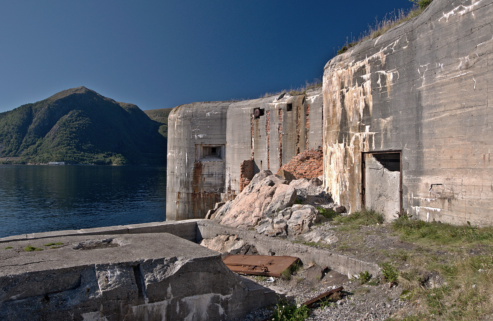 Restene etter det eks-tyske torpedobatteriet på Julholmen utenfor Molde